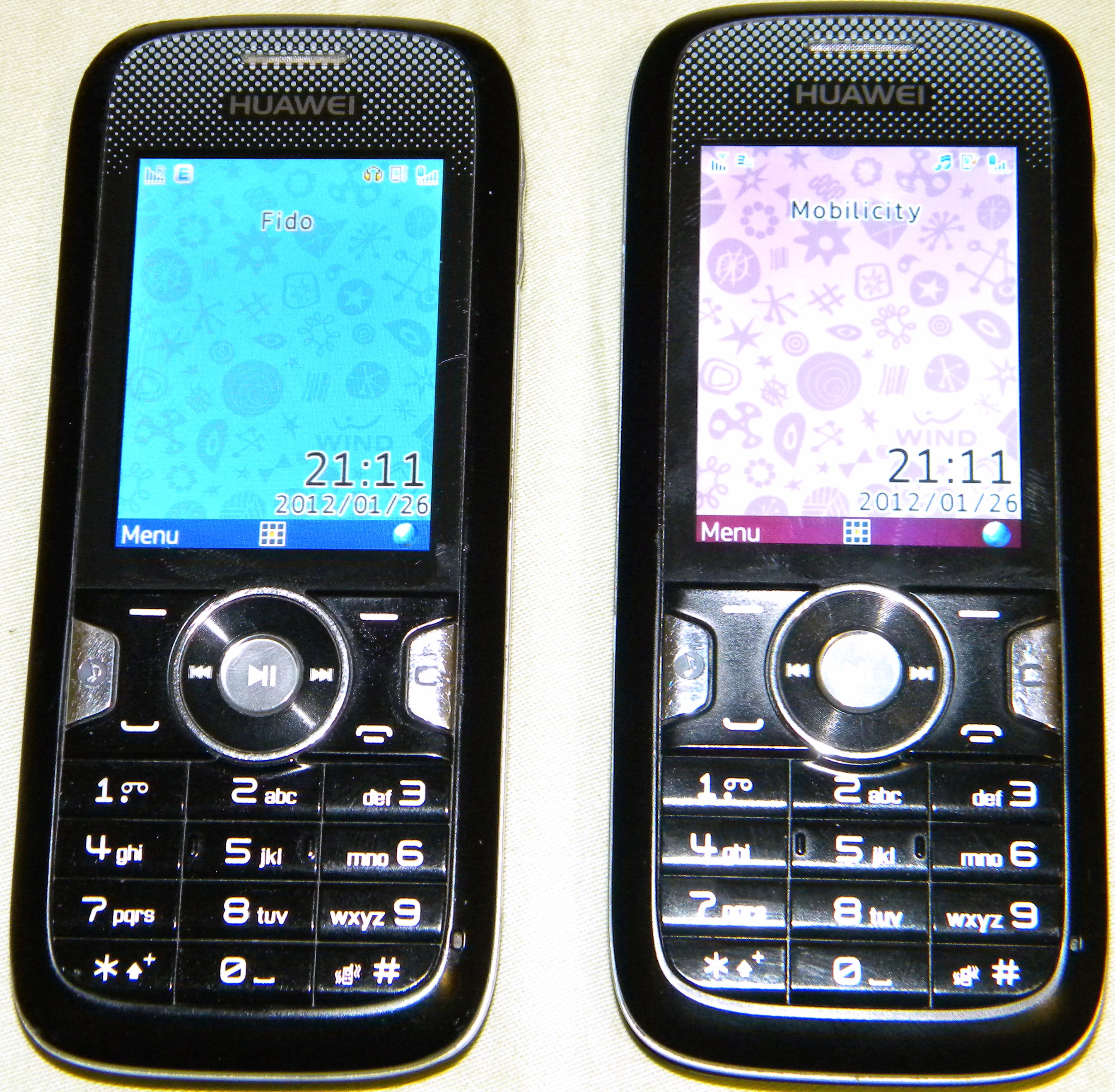 Le téléphone simple Huawei U1250.